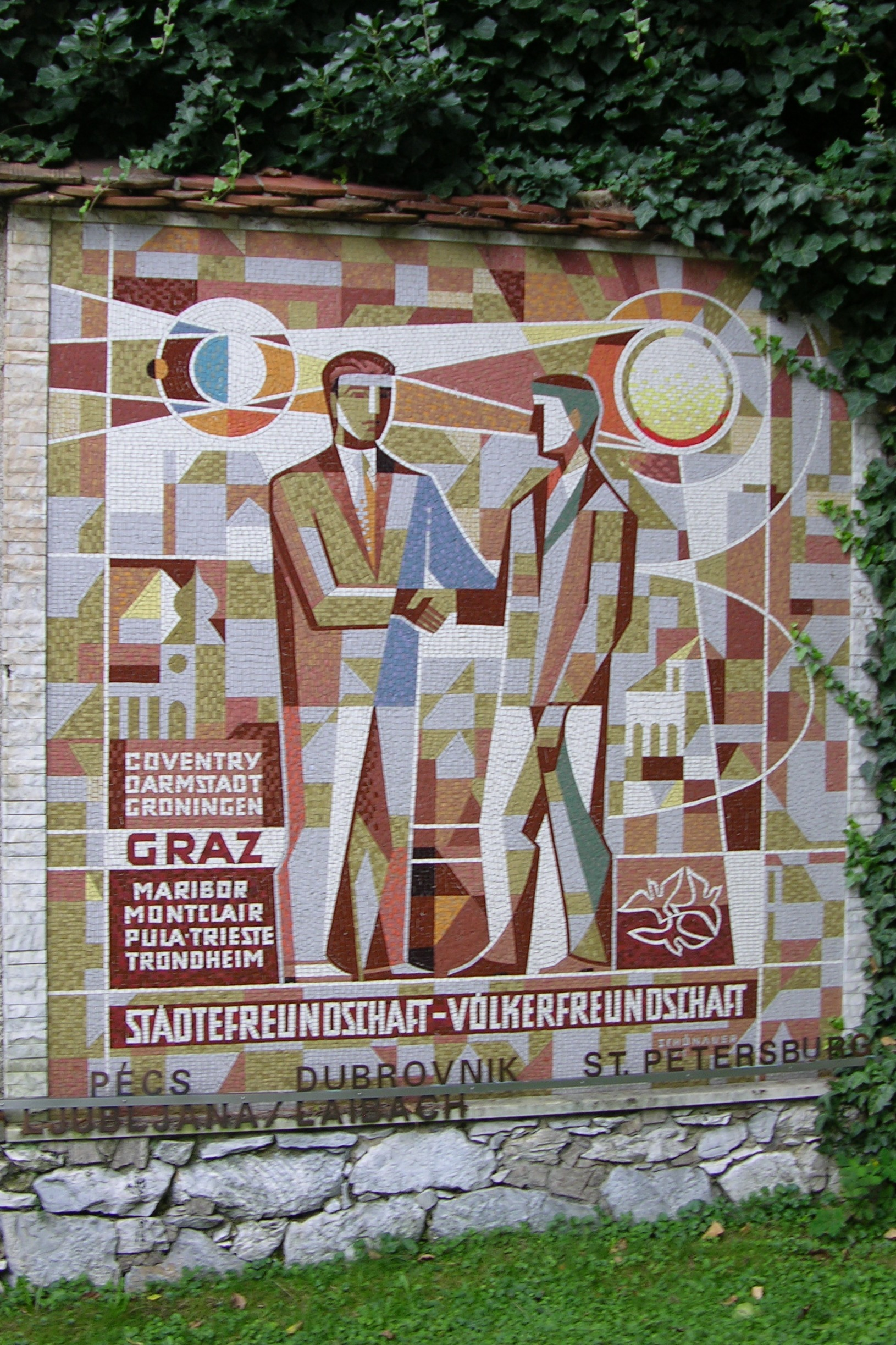 Georg Schönauer: Städtefreundschaft - Völkerfreundschaft, 1971, Denkmal an der Kanonenbastei am Grazer Schlossberg